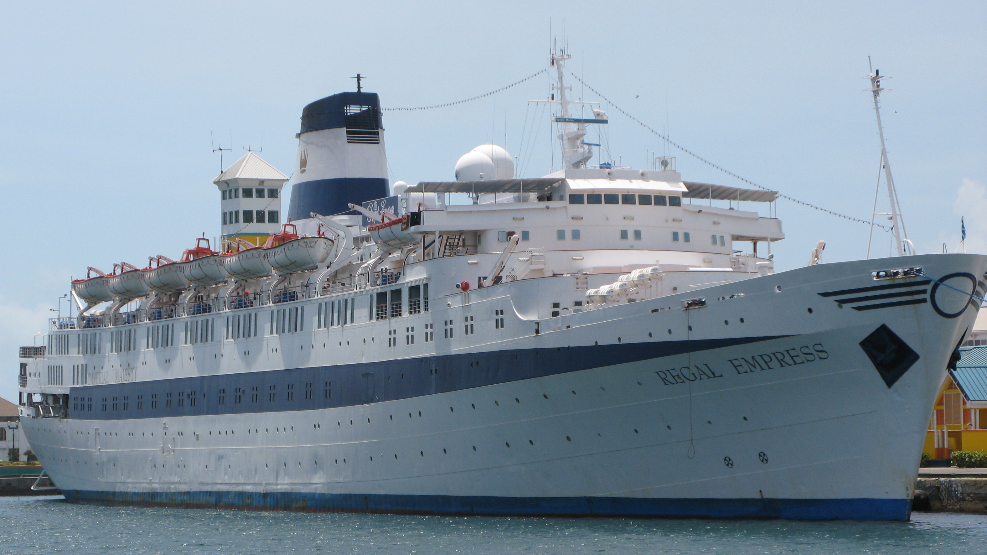 MS Regal Empress in Nassau, Bahamas